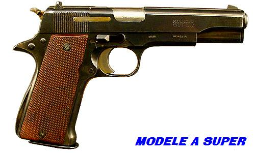 Photo travaillé sous logiciel Paint